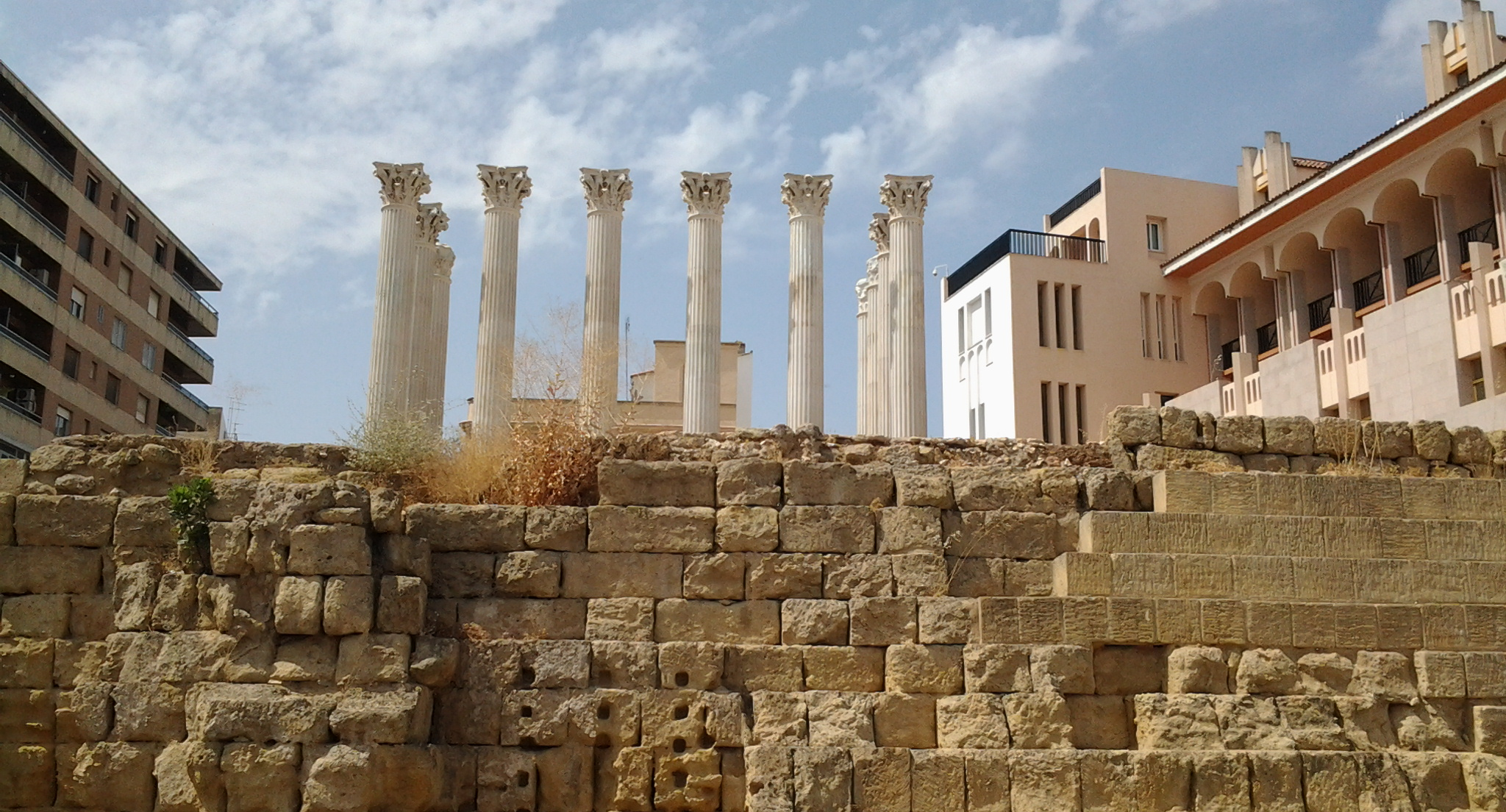 i ruderi del tempio romano a Cordova (Cordoba)